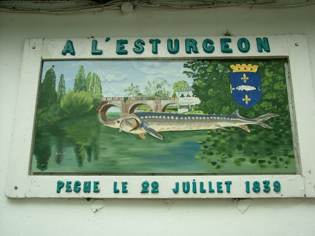 Esturgeon péché à Poissy le 22 juillet 1839 prés du pont ancien.